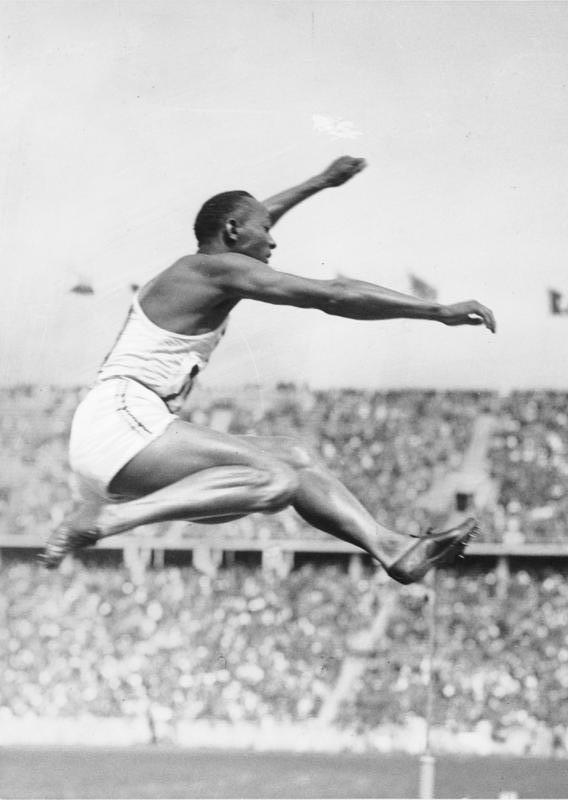 Berlin, Olympiade, Jesse Owens beim Weitsprung Jesse Owens beim Weitsprung [Berlin.- Olympische Sommerspiele, Jesse Owens beim Weitsprung] Abgebildete Personen: Owens, Jesse: Leichtathlet, Olympiateilnehmer 1936, USA (GND 118738917)